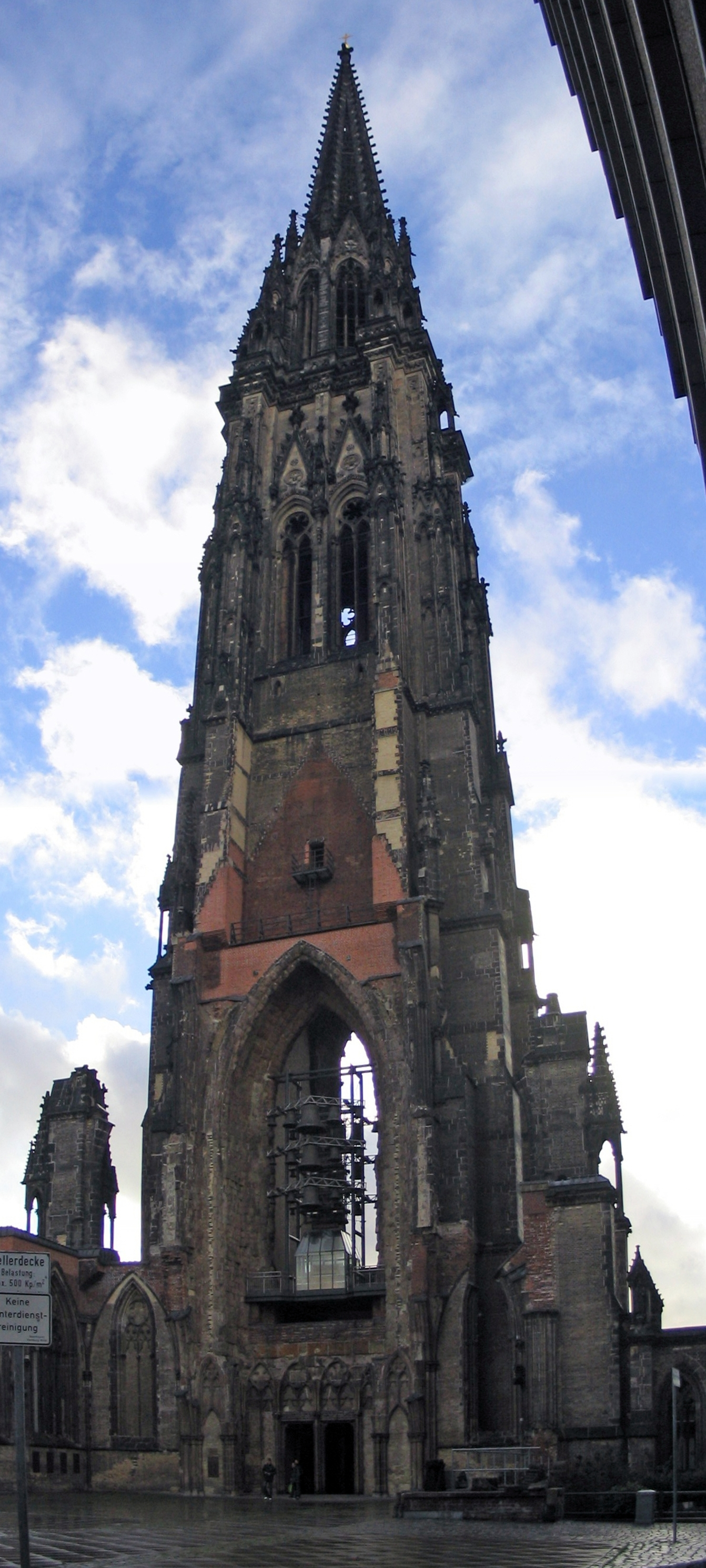 St. Nikolai Turm in Hamburg-Altstadt